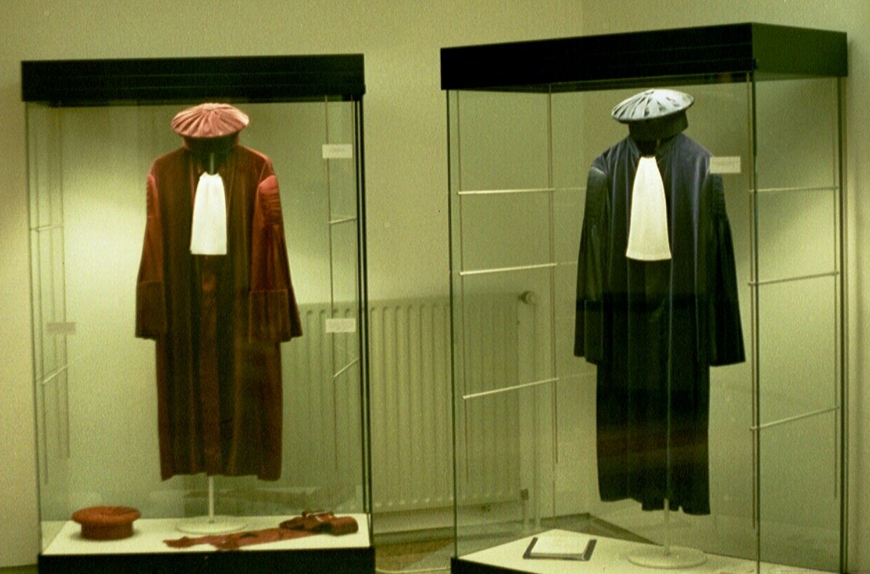 Roben der Richter im Europäischen Gerichtshof